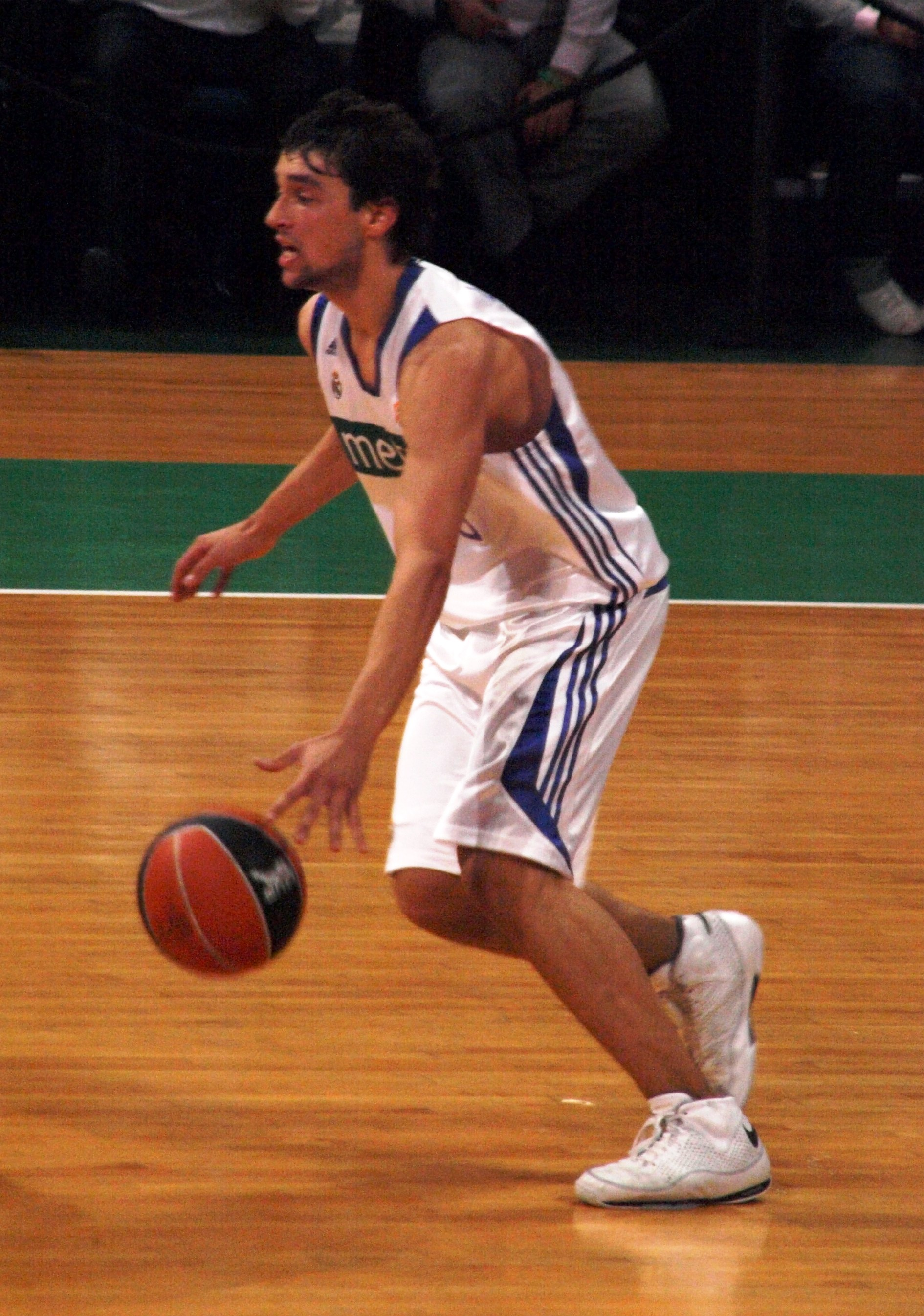 Sergio Llul en el partido que enfrentó al Real Madrid y al DKV Joventut en el Olímpico de Badalona en noviembre de 2008